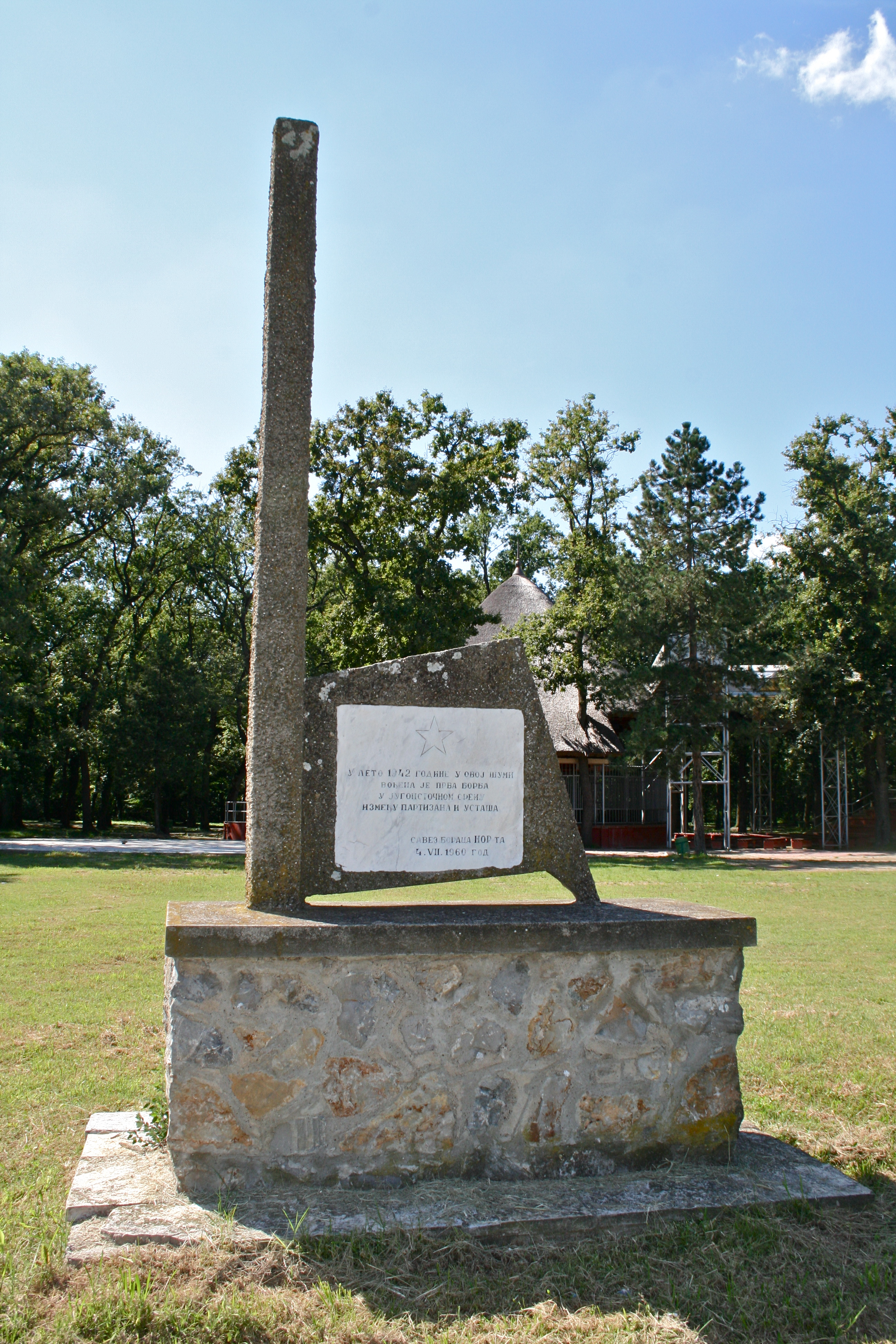 Споменик из НОБ у Бојчинској шуми